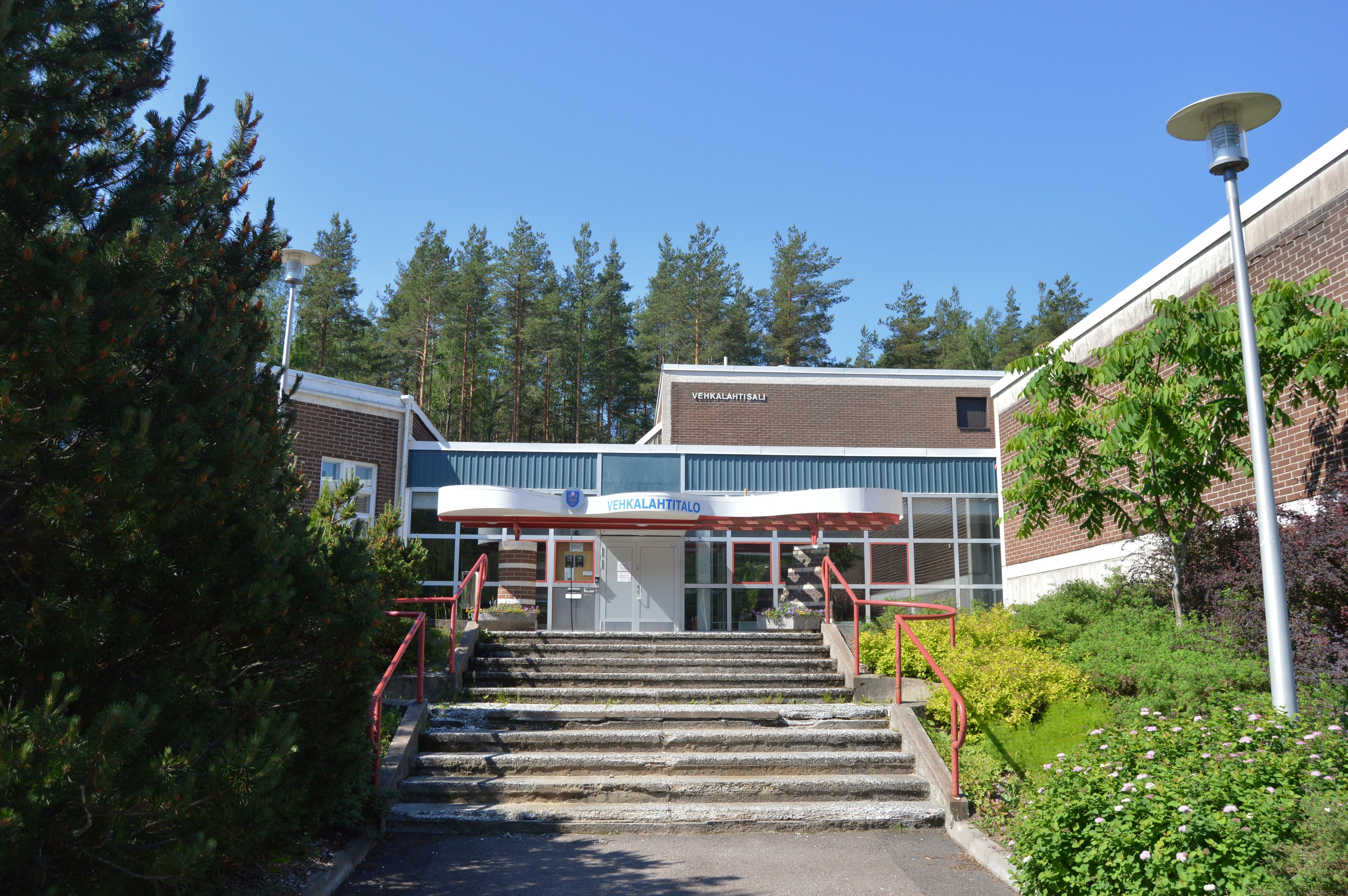 Vehkalahtitalo Haminan Ruissalossa. Rakennuksessa toimii myös kirjasto.